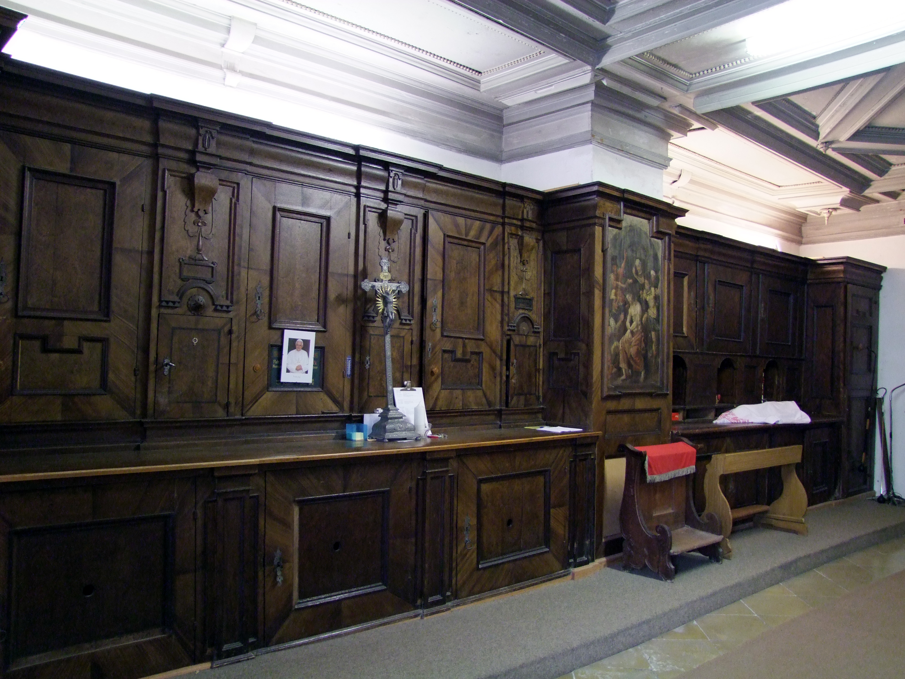 Mariä Verkündigung im oberschwäbischen Mindelheim. Ehemalige Augustiner, dann Jesuitenklosterkirche.